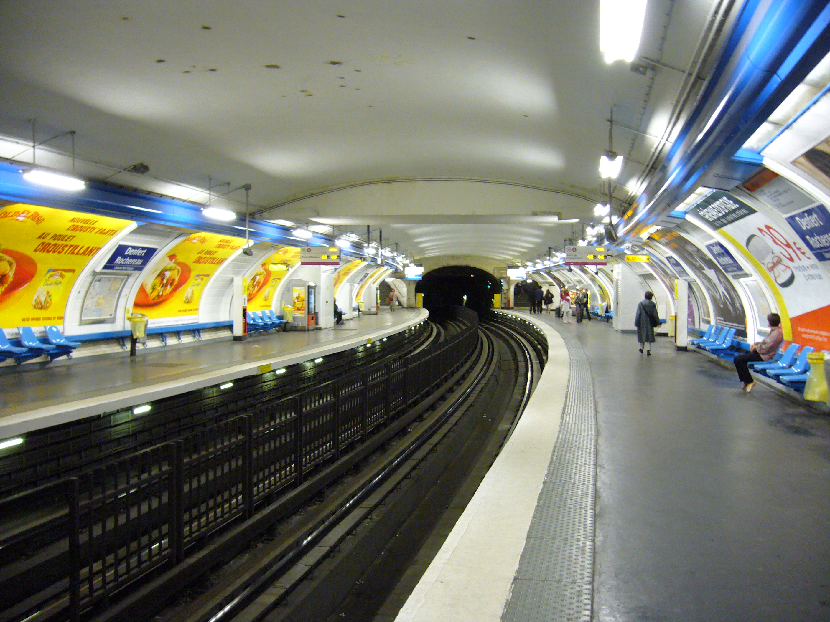 Quais de la station Denfert Rochereau de la ligne 4 du métro de Paris.